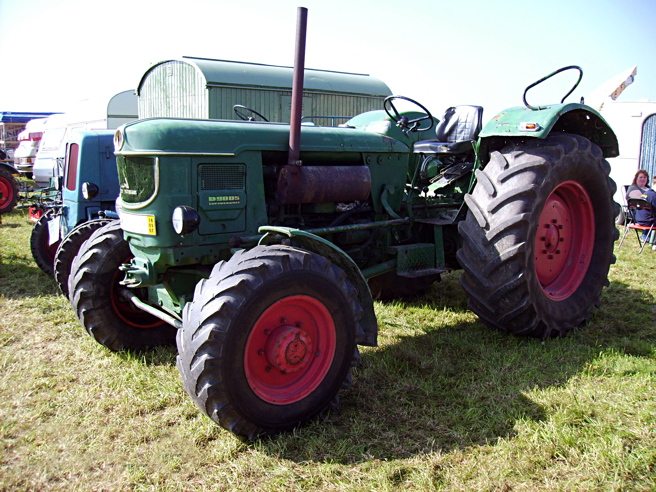 Deutz-Traktor D 9005